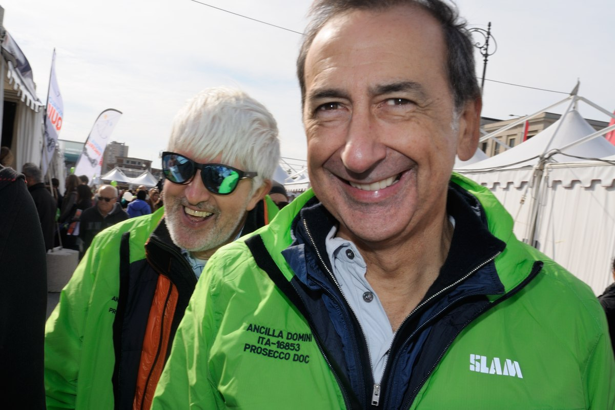 Il giornalista Beppe Severgnini e il sindaco di Milano, Giuseppe Sala, alla 48esima Barcolana.